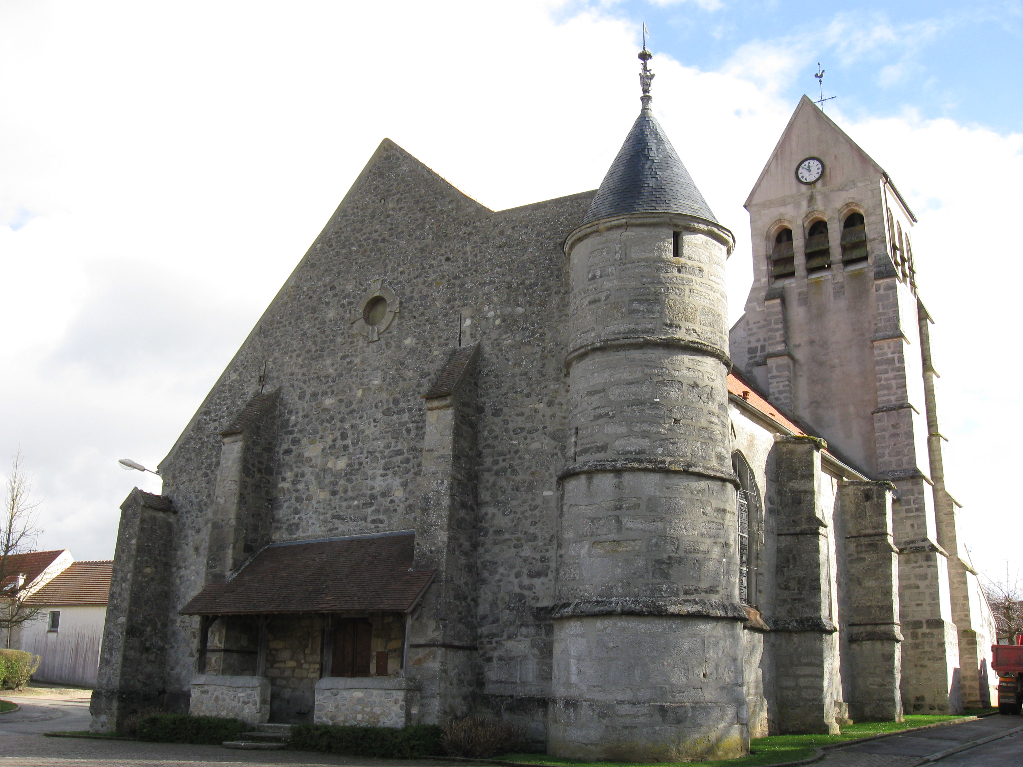 Église Saint-Etienne-et-Saint-Babylas de Marcilly. (Seine-et-Marne, région Île-de-France).